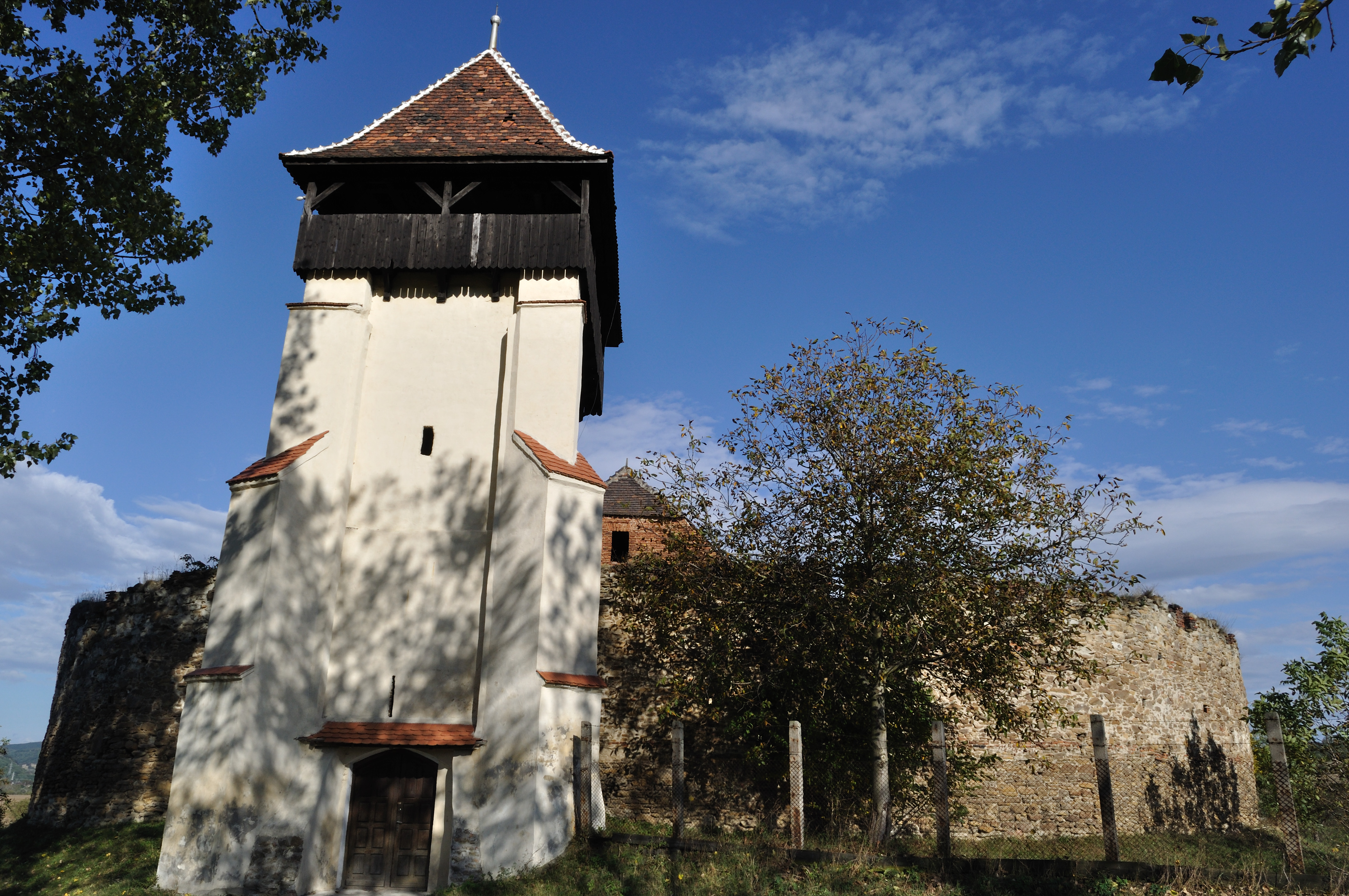 Biserica evanghelică din Țapu, Sibiu